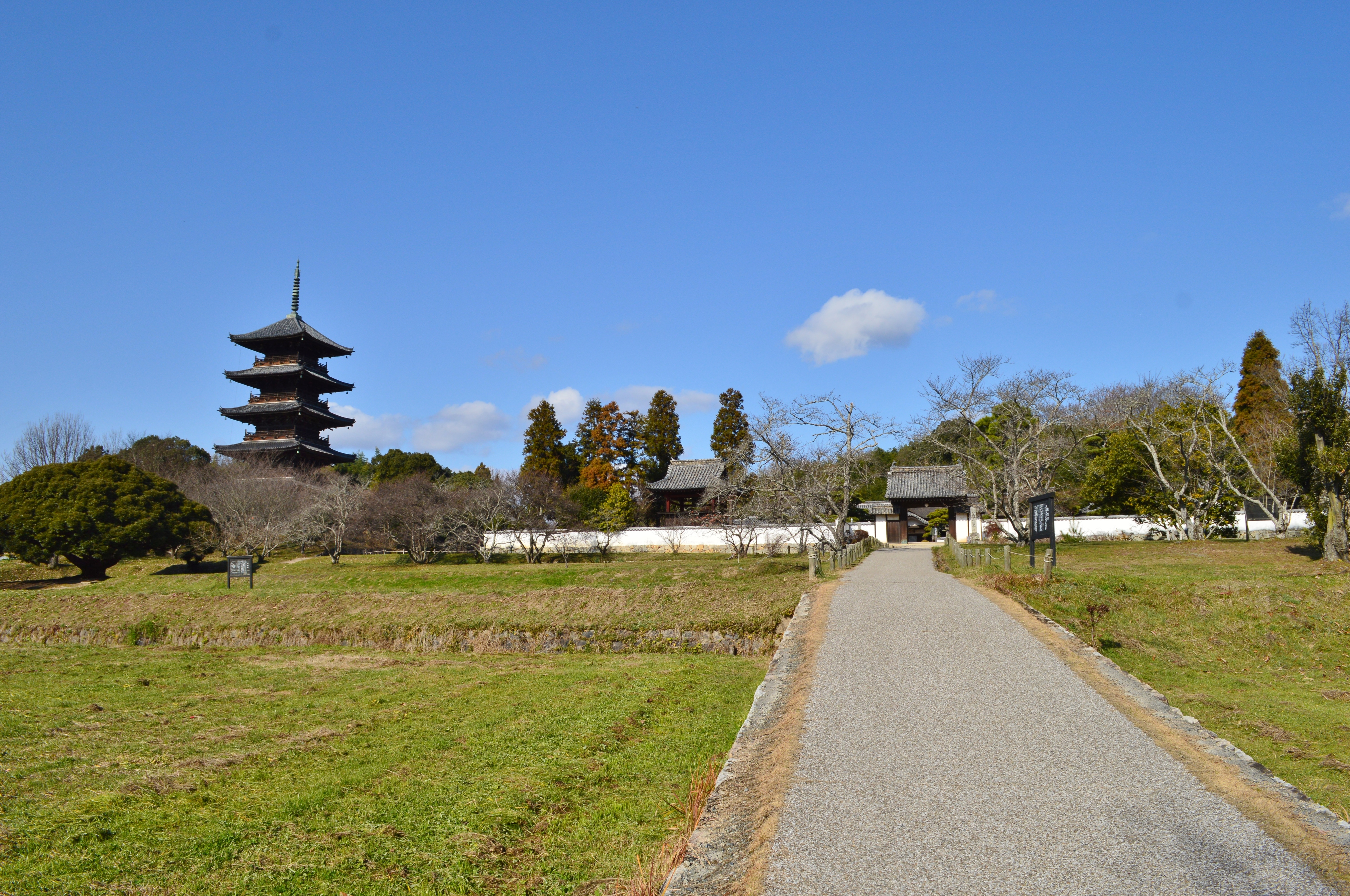 備中国分寺 境内全景